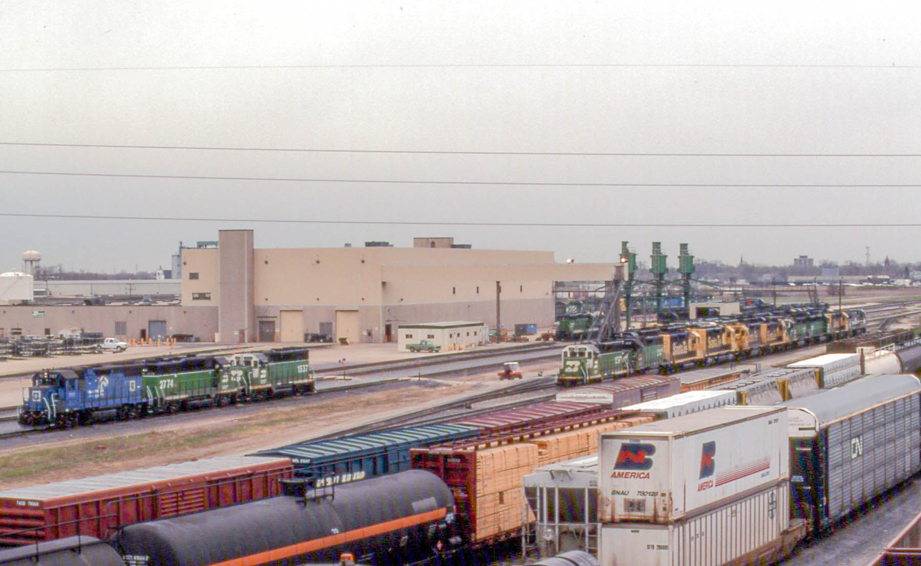 19970427 03 BNSF Galesburg, Illinois